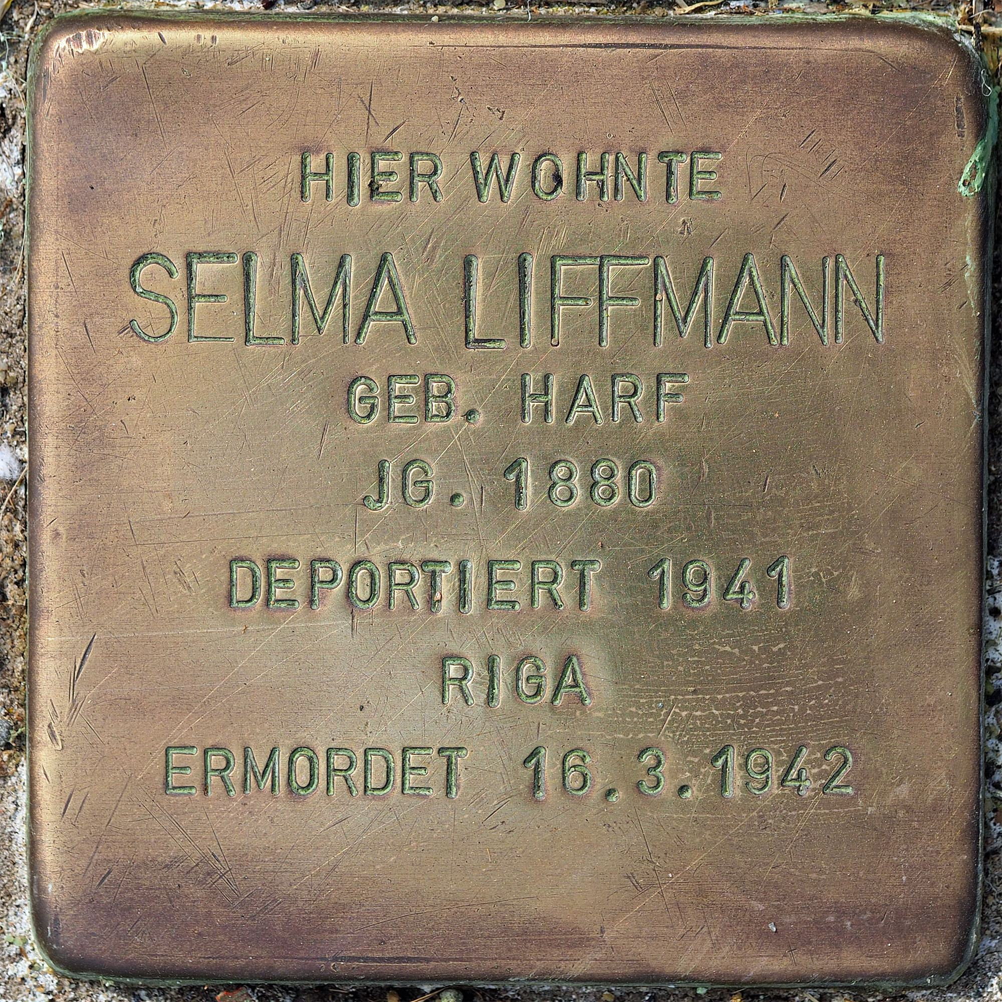 Stolpersteine MG: Liffmann, Selma